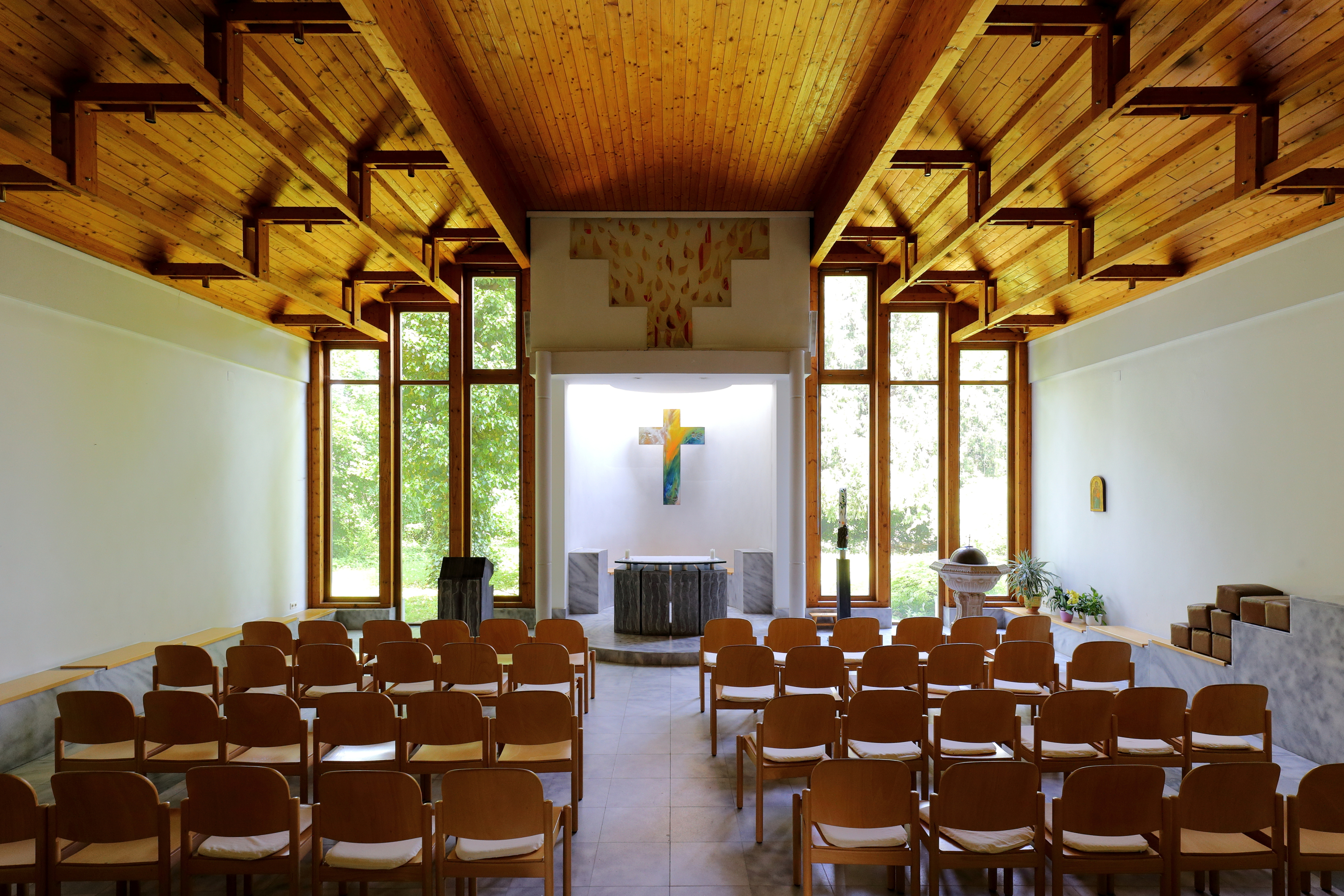 Taufkapelle der Ober St. Veiter Pfarrkirche im 13. Wiener Gemeindebezirk Hietzing.1994 wurde anstelle der 1965 an der Nordseite des Langhauses errichteten Taufkapelle eine neue und größere nach Plänen des Hietzinger Architekten Hermann Bauer errichtet. Sie dient auch als Gottesdienststätte für die Werktage. Die Decke ist eine gestufte, in sichtbauweise ausgeführte Holzkonstruktion. Der Altartisch besteht aus Wachauer Marmor und weist auf der Stirnseite zwölf reliefierte Figuren auf, die die zwölf Apostel darstellen. Zur rechten Seite des Altar befindet sich der Ambo, der ebenfalls aus Wachauer Marmor gefertigt ist und im Relief den Auferstandenen mit den Emmausjüngern zeigt. Sowohl Altar als auch Ambo sind ein Werk des Lienzer Künstlers Peter Niedertscheider. Zur linken Seite des Altar befindet sich das Taufbecken, das aus dem 19. Jahrhundert stammt.